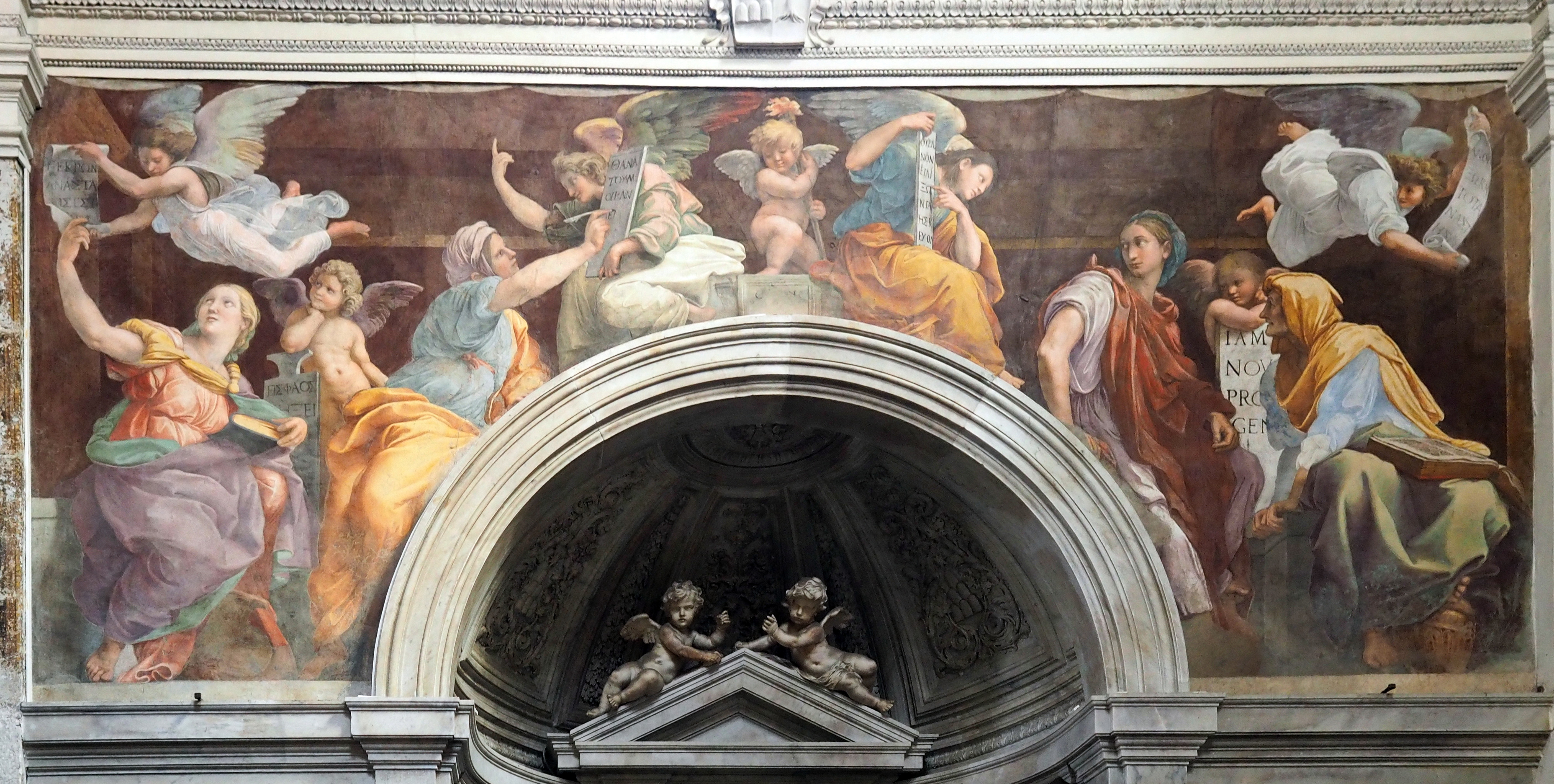 Santa Maria della Pace Raffaello Sibille